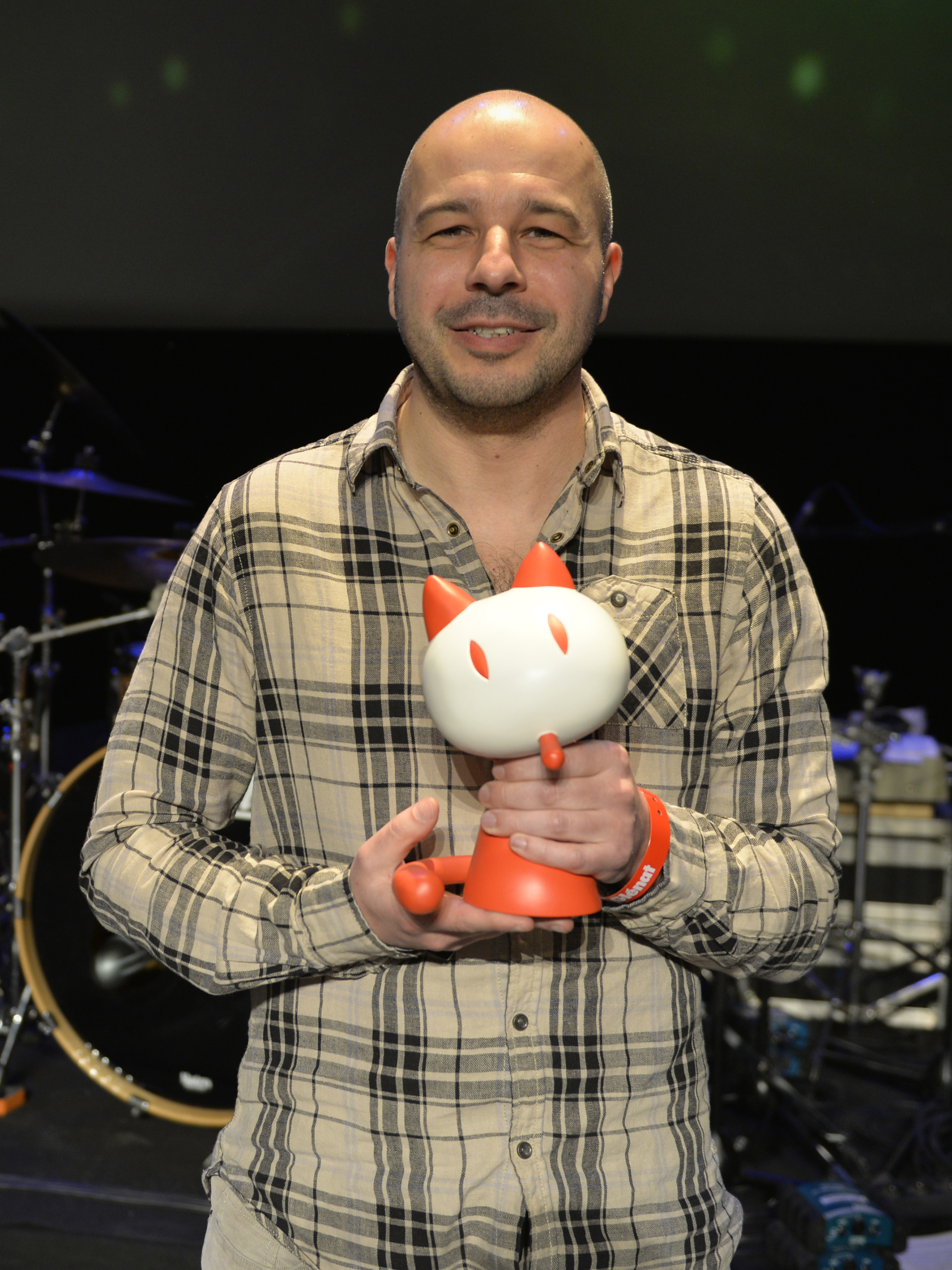 Tébo avec le Fauve jeunesse au Festival International de la Bande Dessinée d'Angoulême 2017.